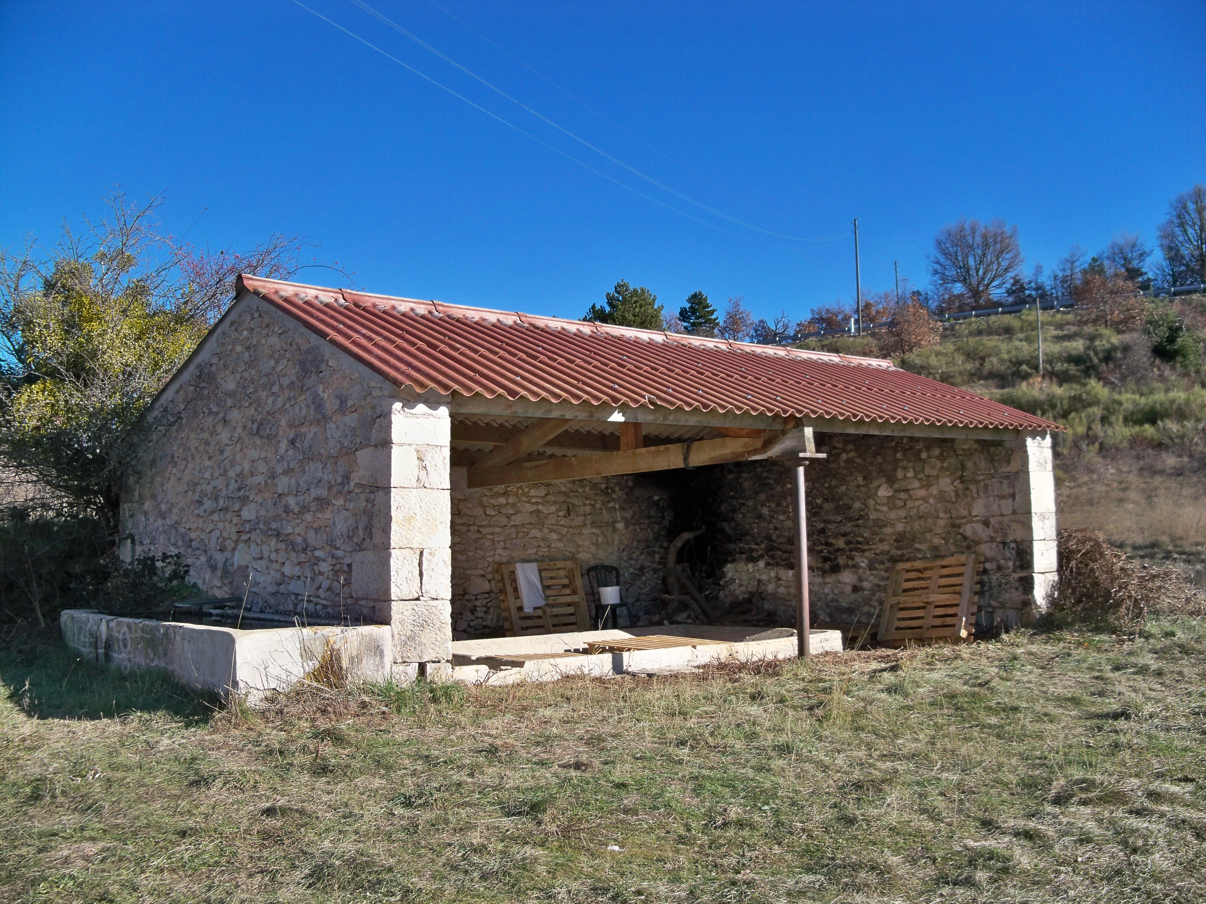 Lavoir de la Combe du Pommier, à Revest du Bion (04)